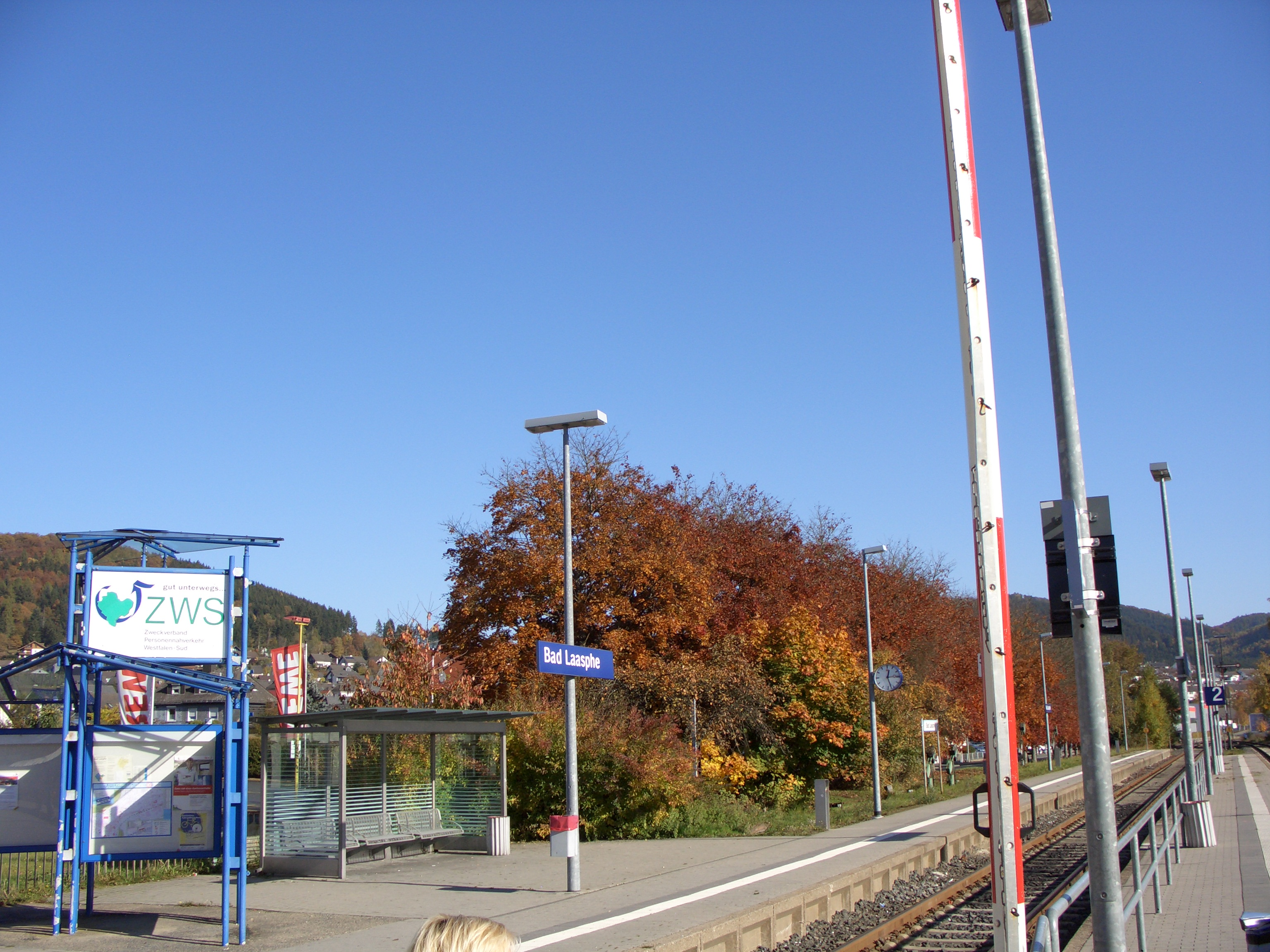 Zu sehen ist Gleis 1 mit Bahnsteig. Ganz links stehen einige Informationsvitrinen mit Fahrplänen u.Ä. des ZWS, daneben das Wartehäuschen und ein Bahnhofsschild. Ganz rechts liegt der Bahnsteig von Gleis 2.